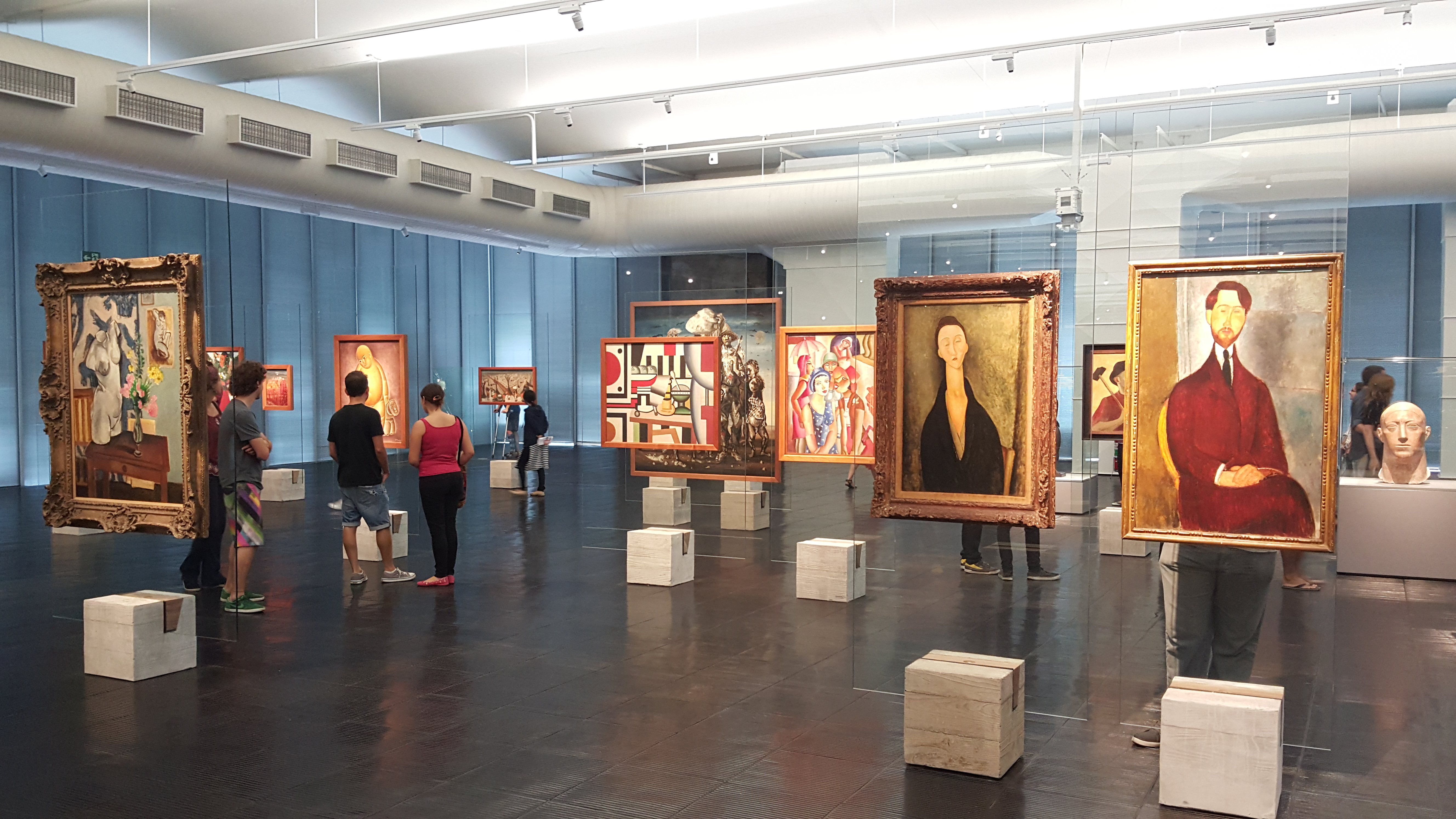 Museu de Arte de São Paulo Assis Chateaubriand - MASP: edifício e acervo móvel constituído pelos cavaletes de concreto e cristal